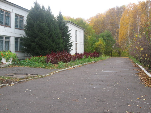 Фасад Отраднинской школы